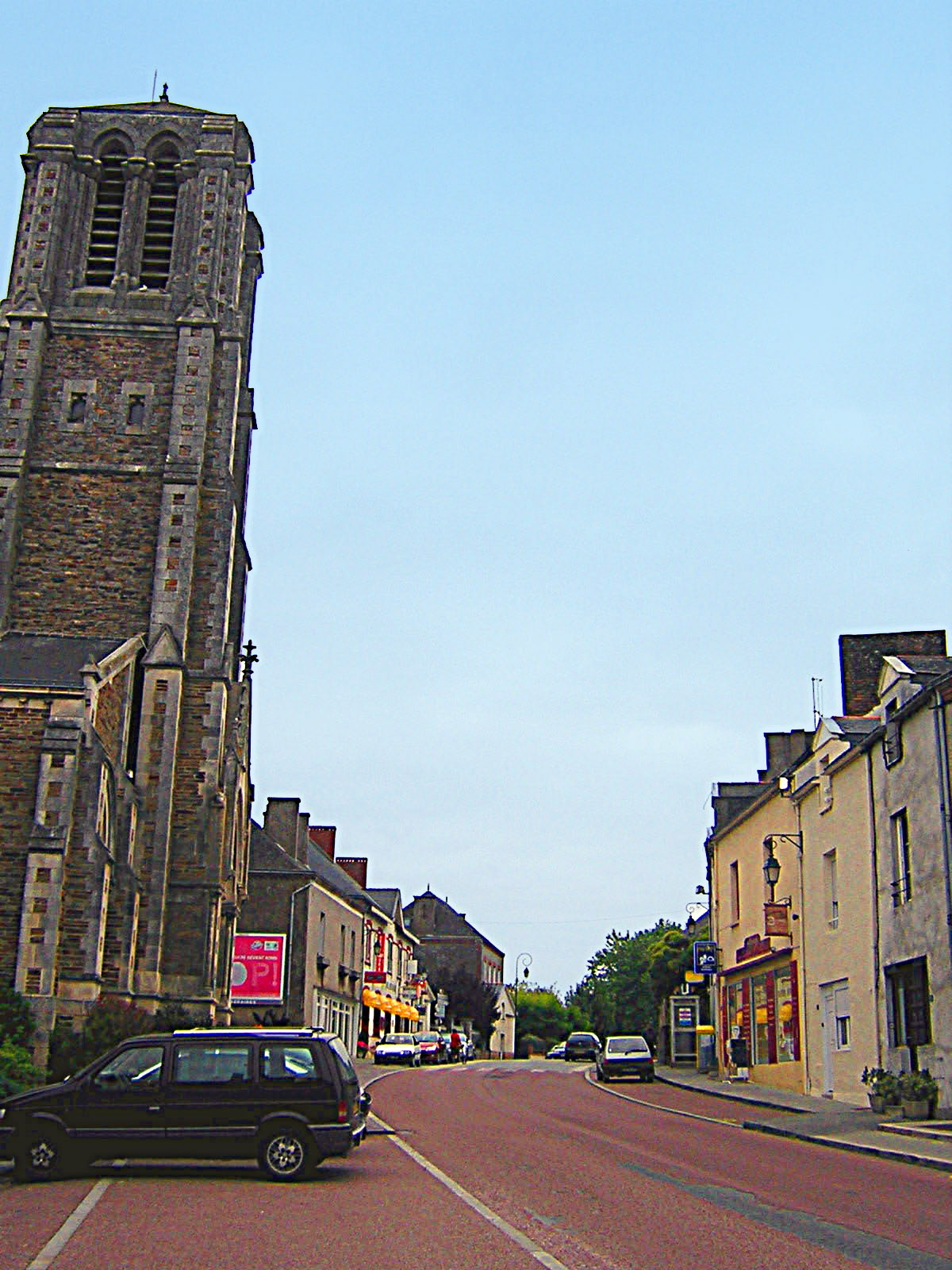 La route traversant Joué-sur-Erdre